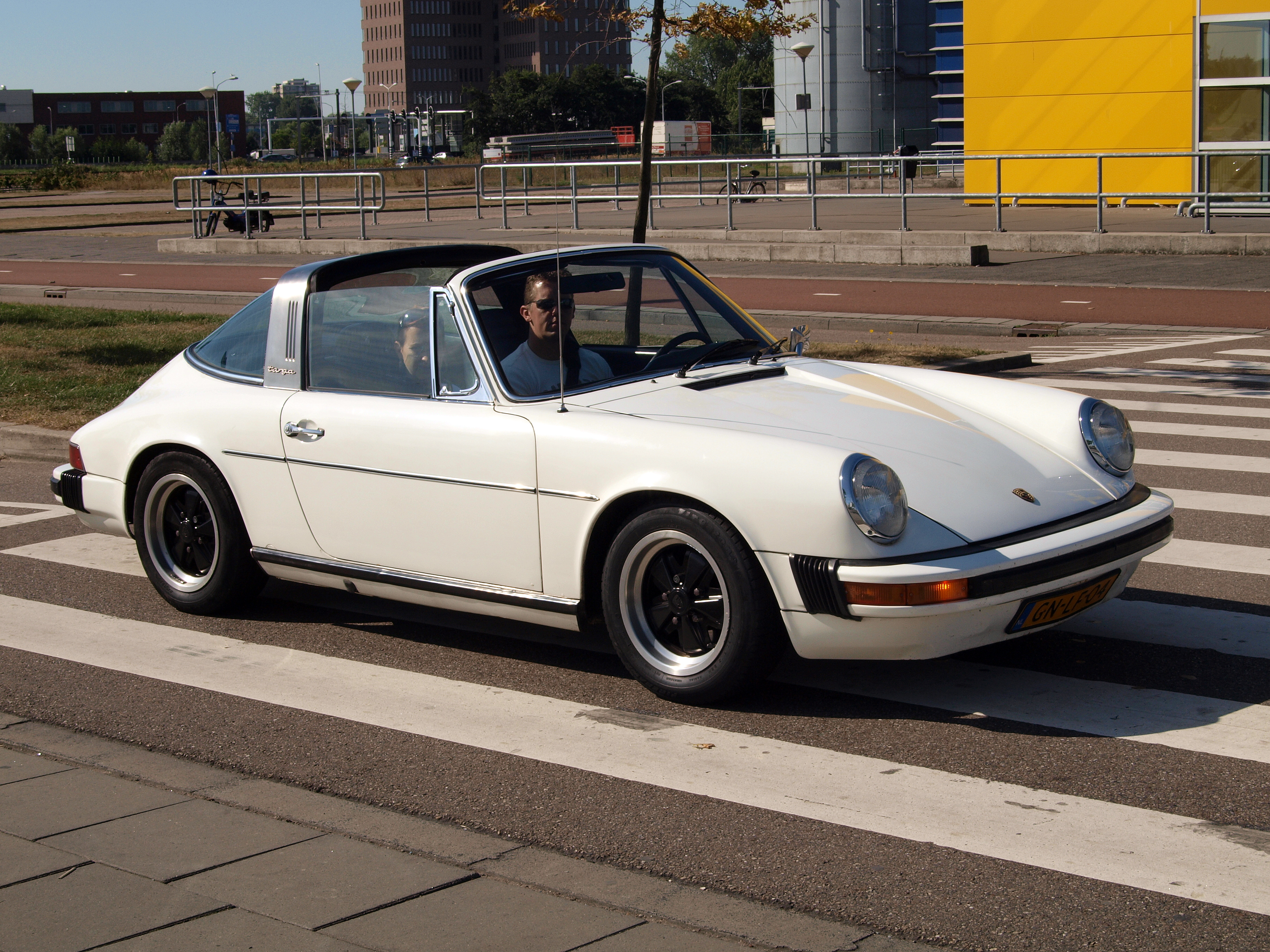 Porsche 911 Targa US GN-LF-04